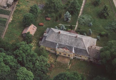 Anarcs.